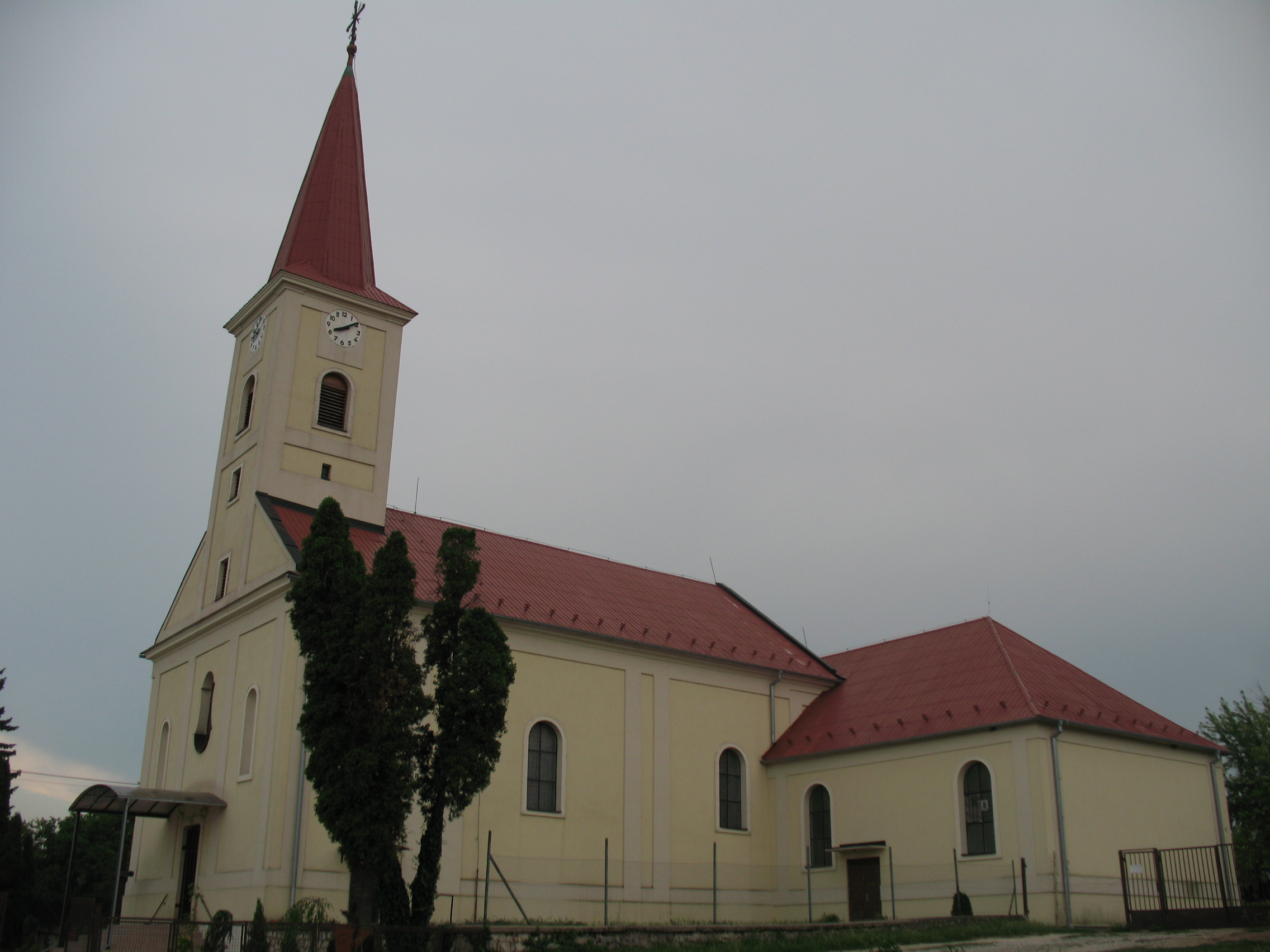 Nyitraújlak